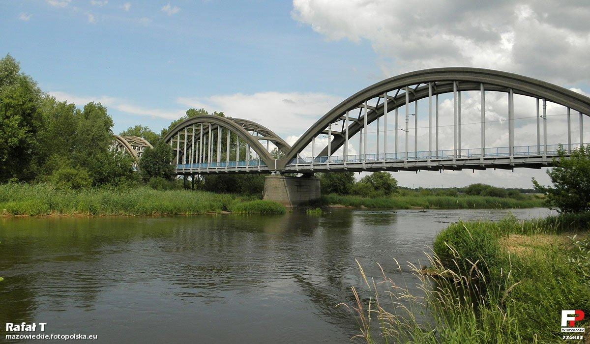 Most na Pilicy - widok z przystani kajakowej.